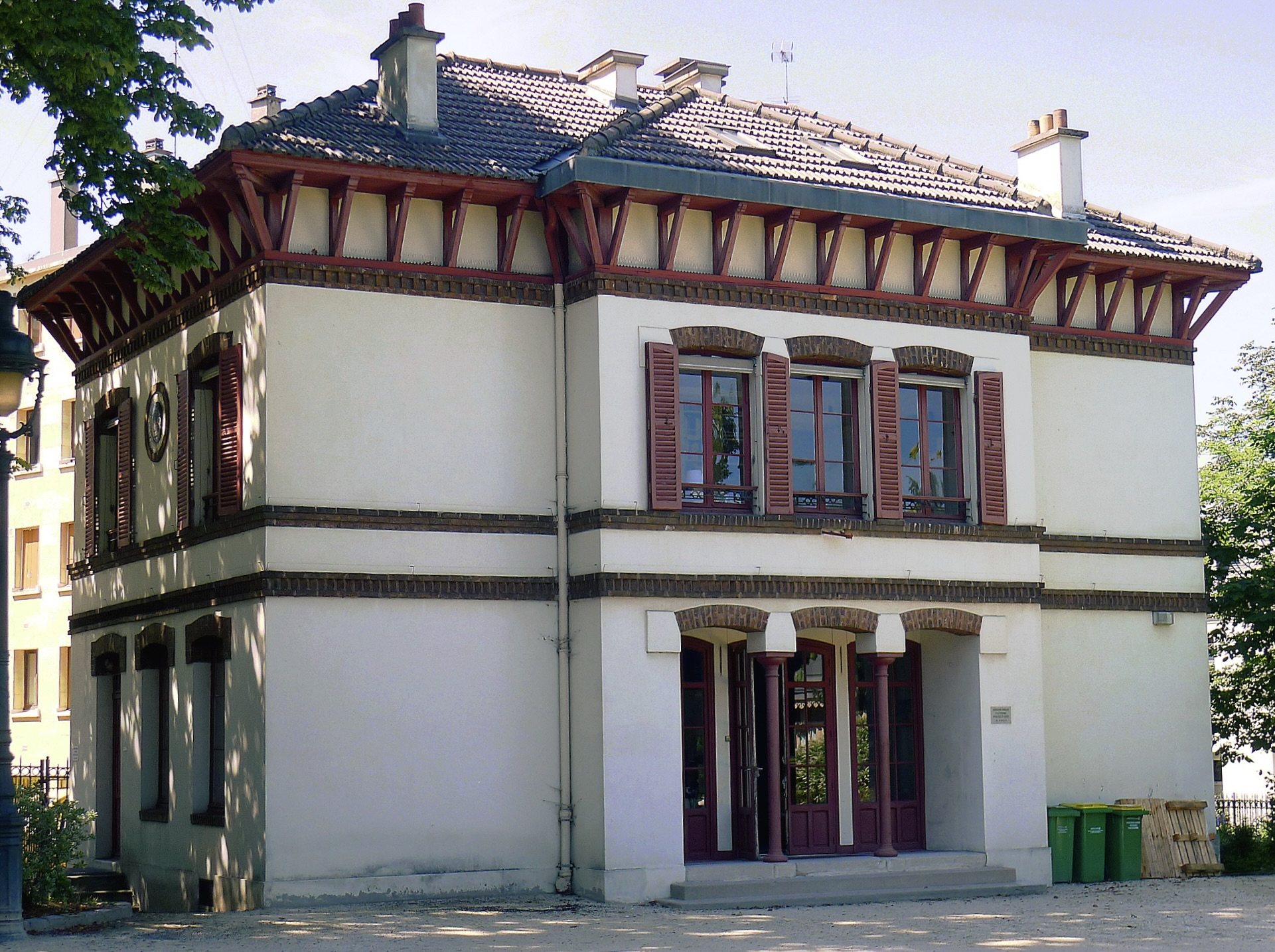 Pavillon occupé par l'Association française d'astronomie (AFA), Parc Montsouris, 17 rue Émile-Deutsch-de-La-Meurthe, Paris XIV